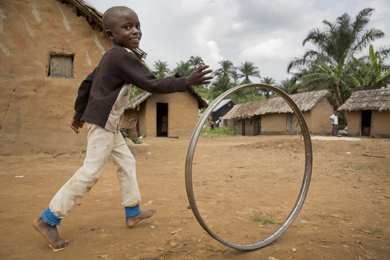 A boy is playing with a hoop in the streets of Pinga, a sign that life has returned to this town long occupied by the NDC (Nduma Defense of Congo) militia. On 4 December 2013, the Congolese Armed Forces (FARDC) and MONUSCO Intervention Brigade undertook offensive actions to oust this armed group from the town located 148 km north-west of Goma in eastern DRC. Photo: MONUSCO/Sylvain Liechti Un garçon joue avec un cerceau dans les rues de Pinga, signe que la vie reprend son cours normal dans cette ville longtemps occupée par la milice NDC (Nduma Défense du Congo). Le 4 décembre 2013, les Forces Armées congolaises et la Brigade d’intervention de la MONUSCO avaient lancé une offensive amenant cette milice à se retirer de cette ville située à 148 km au Nord-Ouest de Goma à l’Est de la RDC. Photo: MONUSCO/Sylvain Liechti